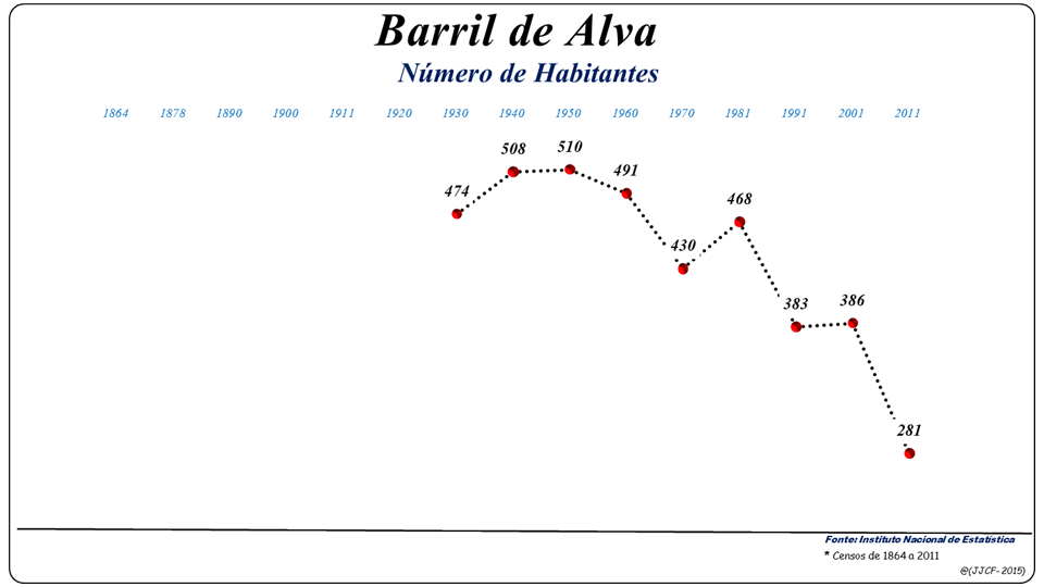 População